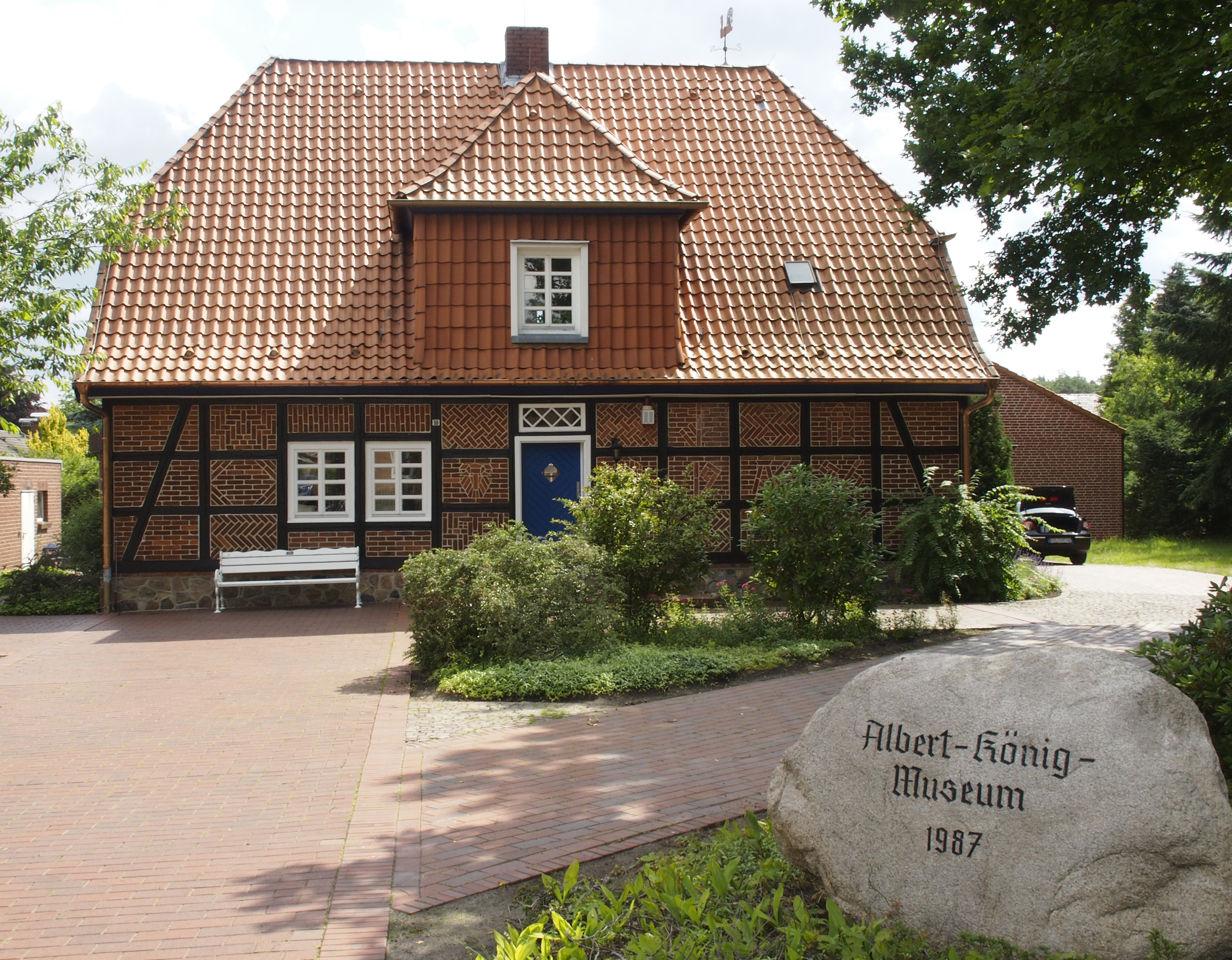 Ehemaliges Wohnhaus von Albert König, jetzt das Albert-König-Museum, Unterlüß (Germany)